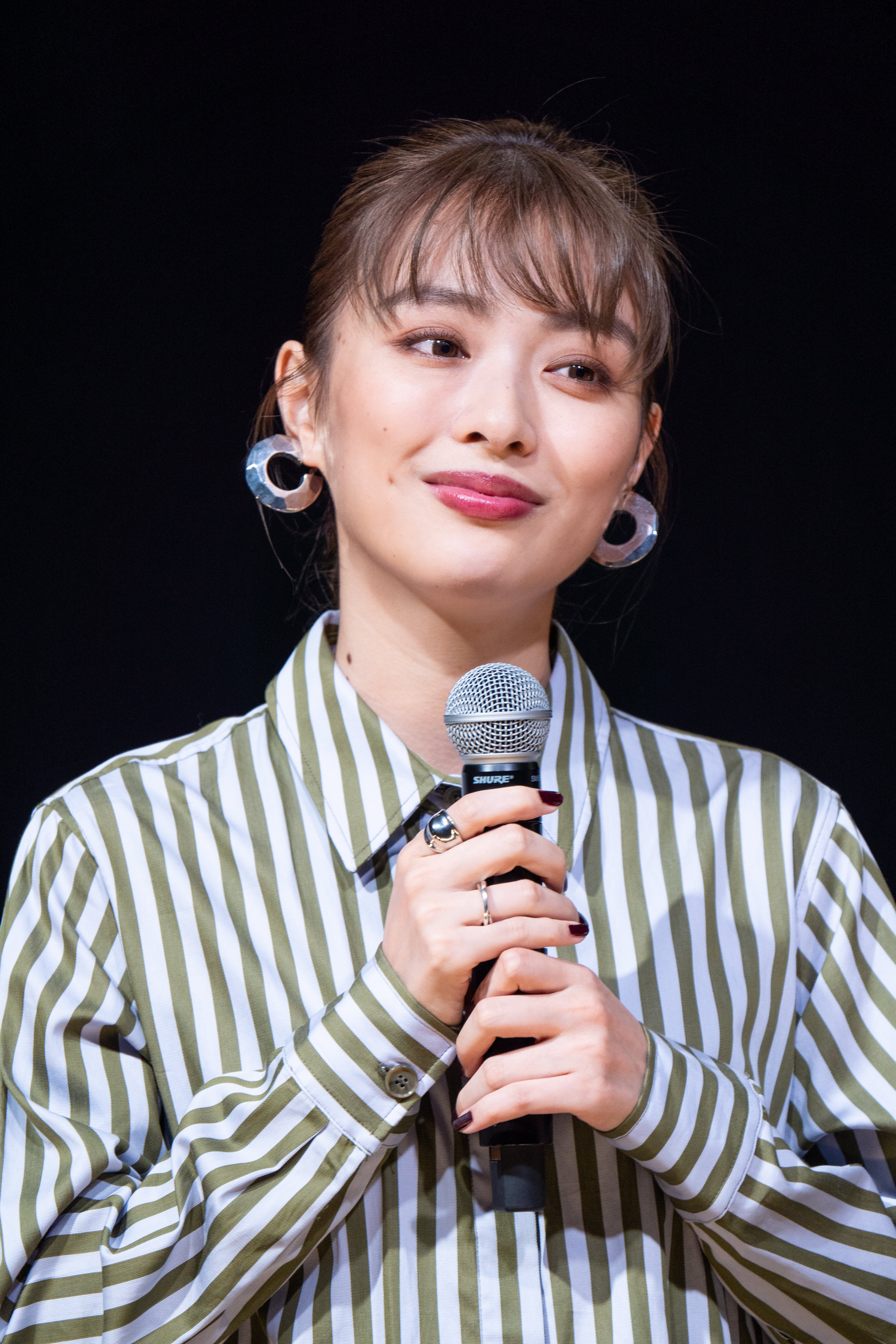 Super! C CHANNEL 2019 内田理央